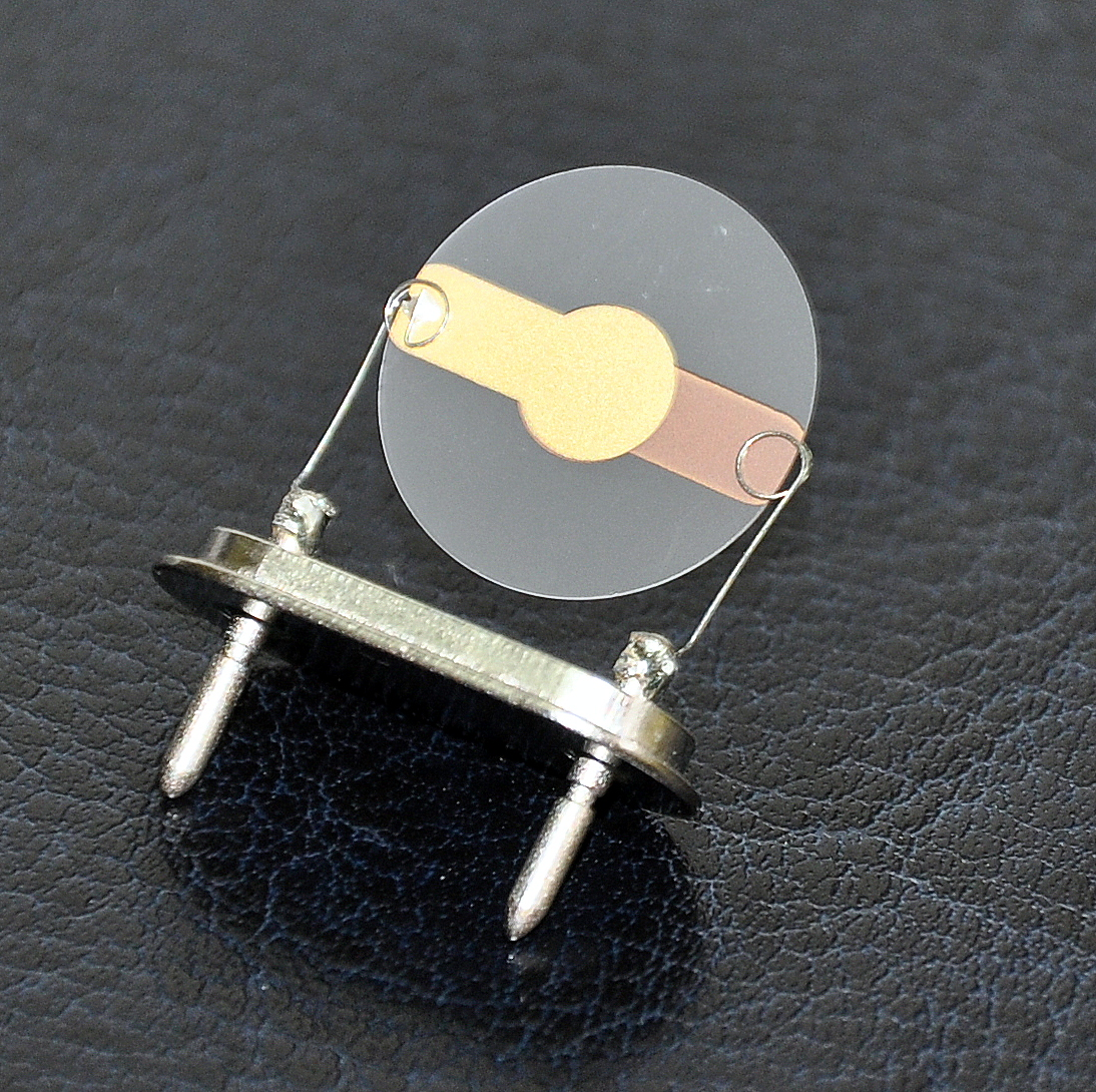 Kryształek kwarcowy z napylonymi złotymi elektrodami. Wykorzystywany do kalibrowania mikrowagi kwarcowej.